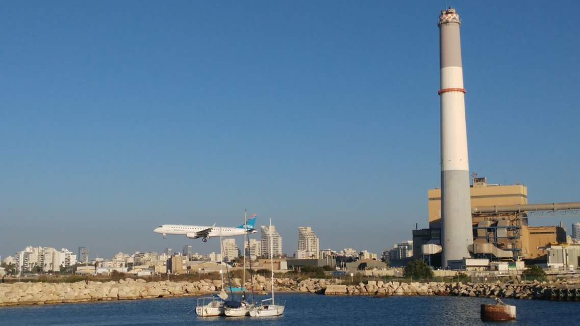 מטוס ארקיע ממריא על רקע תחנת הכוח רידינג